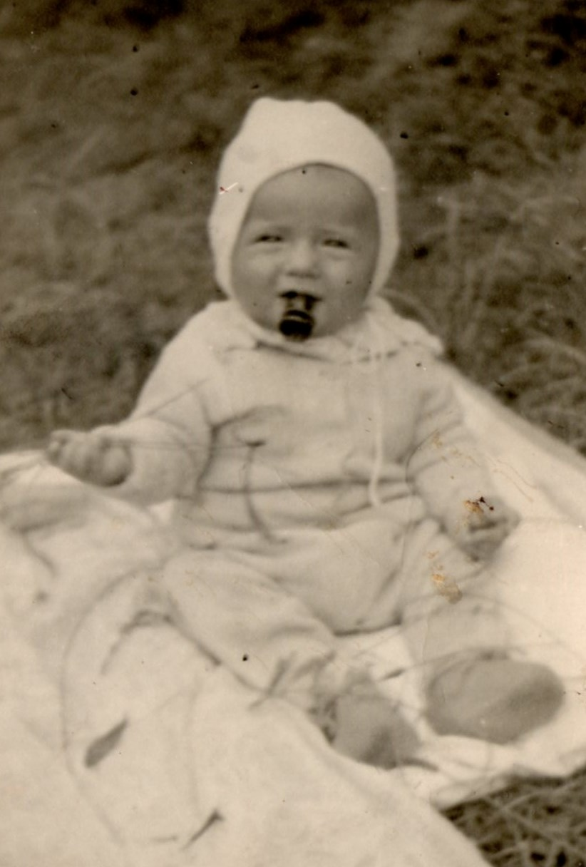 Alenka Jeřábková